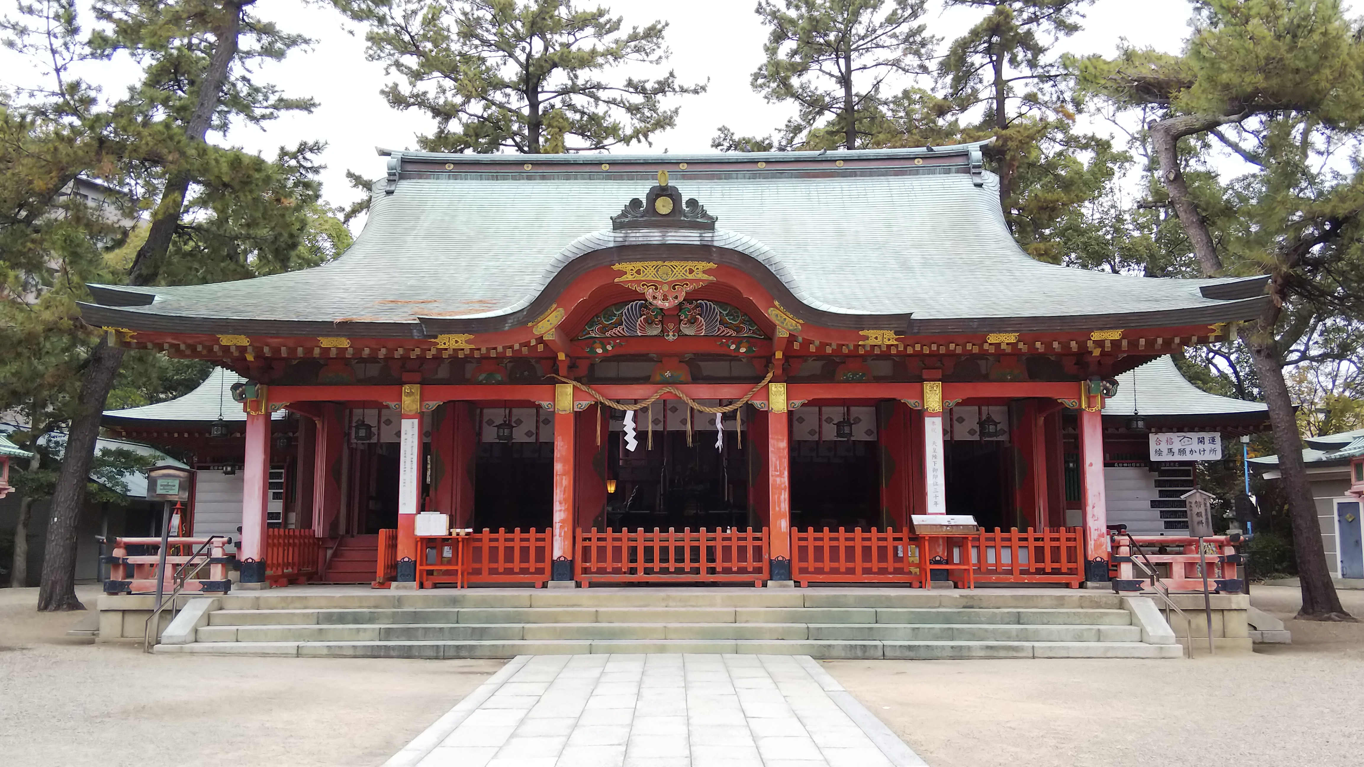 長田神社拝殿